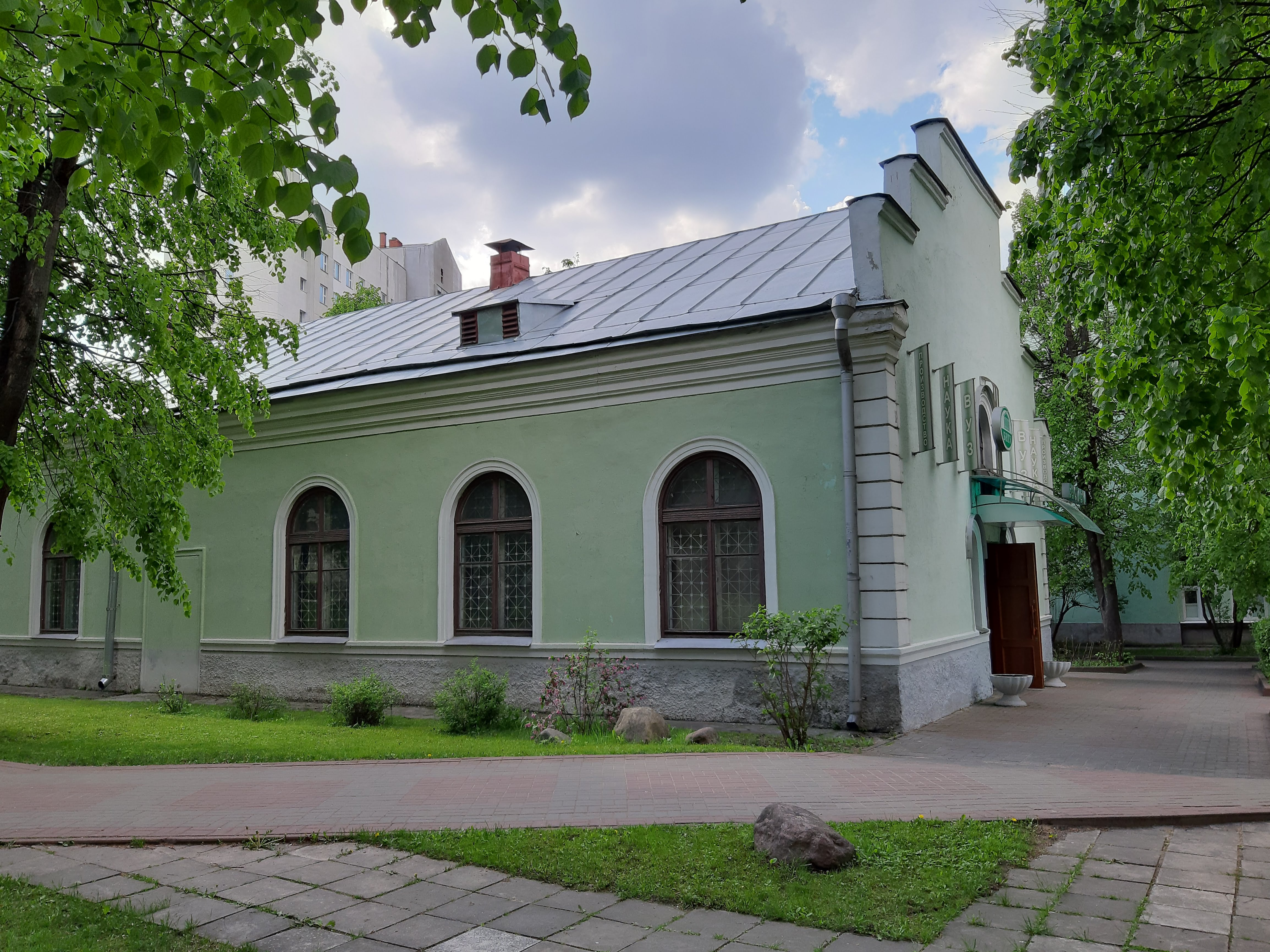 Мінск. Па БНТУ у маі 2019